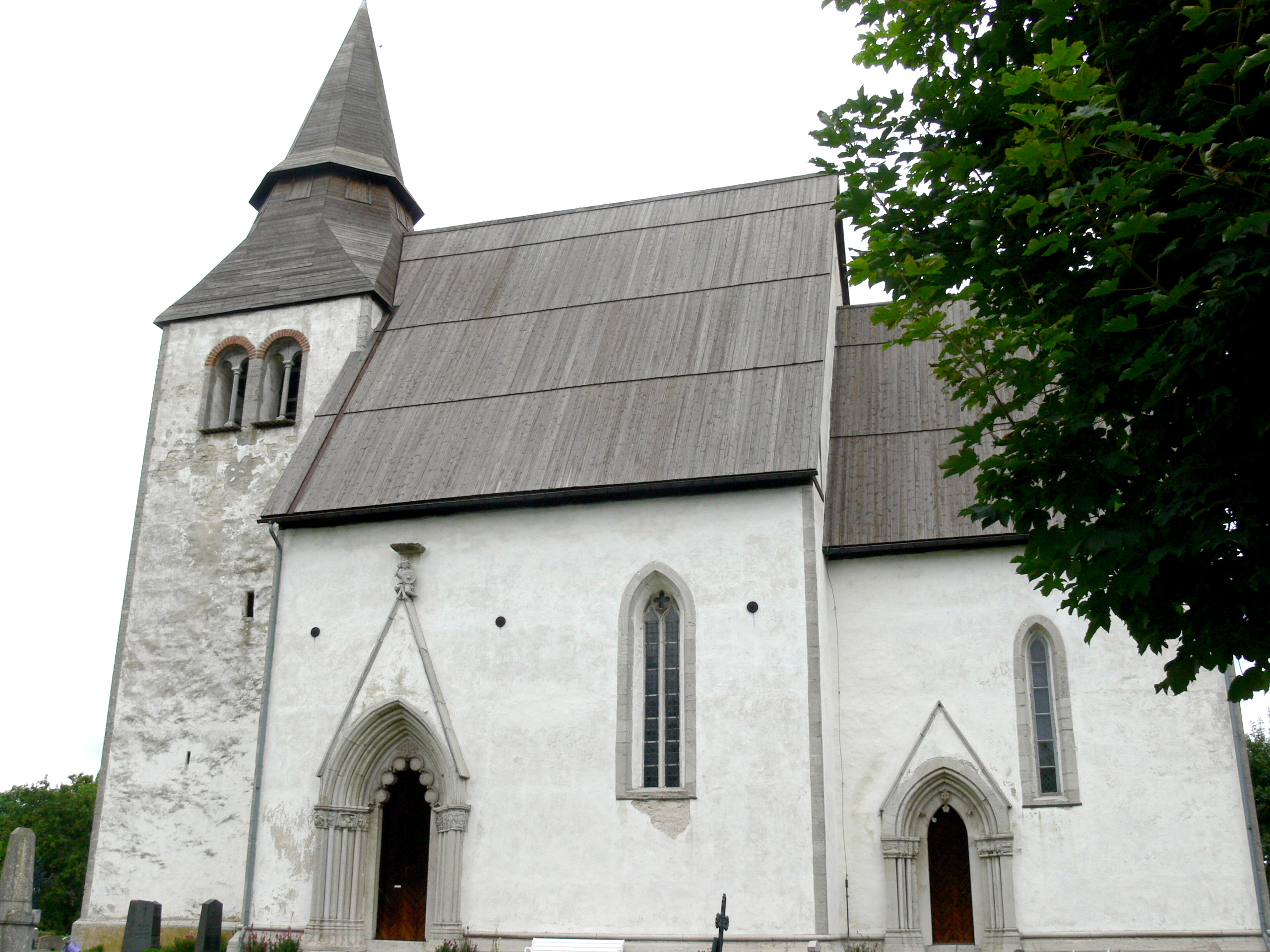 Hörnse kyrka auf Gotland. Außenansicht